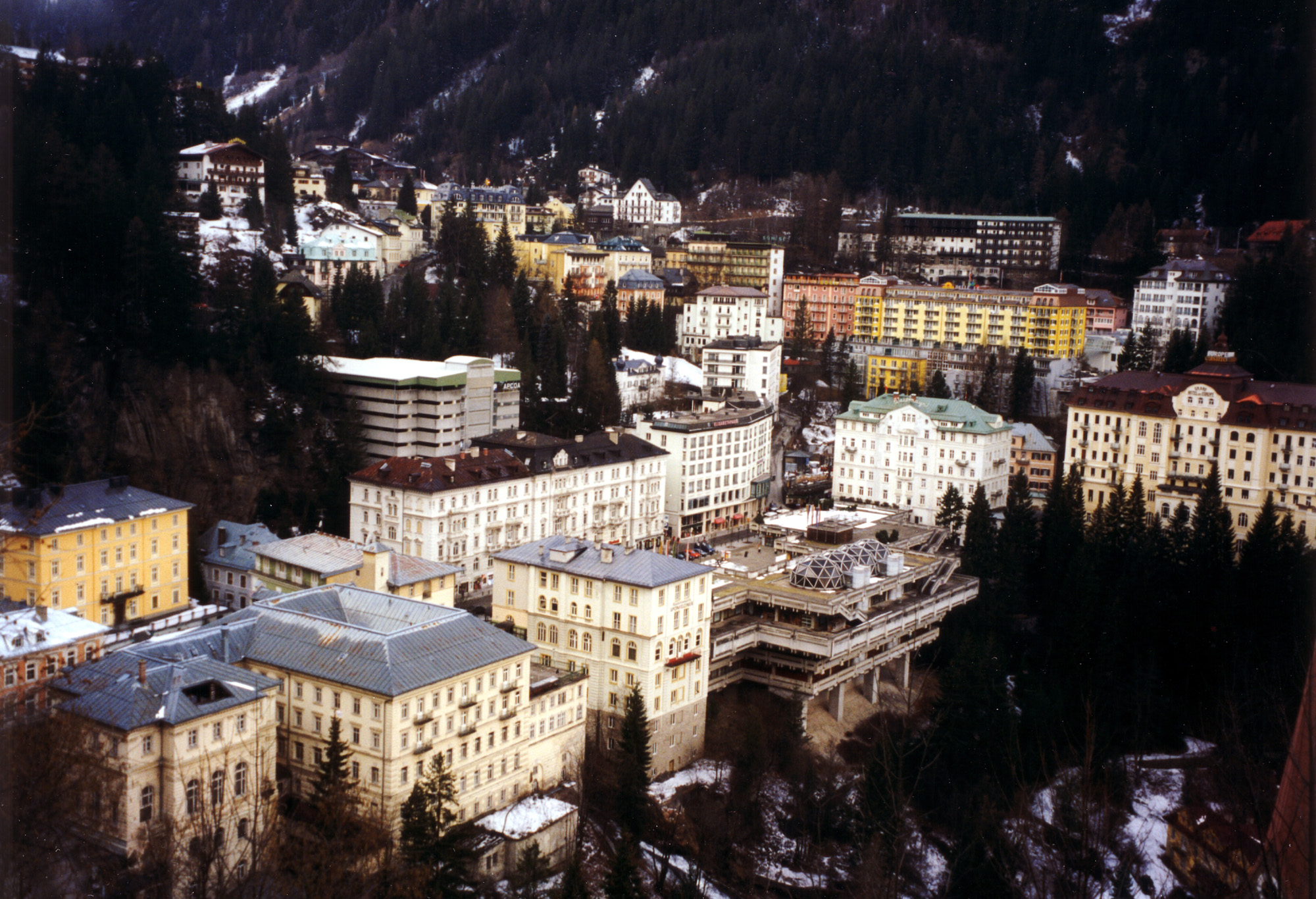 Bad Gastein - Blick auf den rechts des Wasserfalls liegenden Teil des Ortszentrums mit Kongresshaus und Hotelanlagen. Andere Versionen